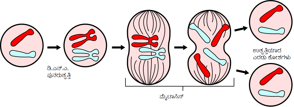 ಕನ್ನಡ: ಮೈಟಾಸಿಸ್ ಜೀವಕೋಶ ವಿಭಜನೆ